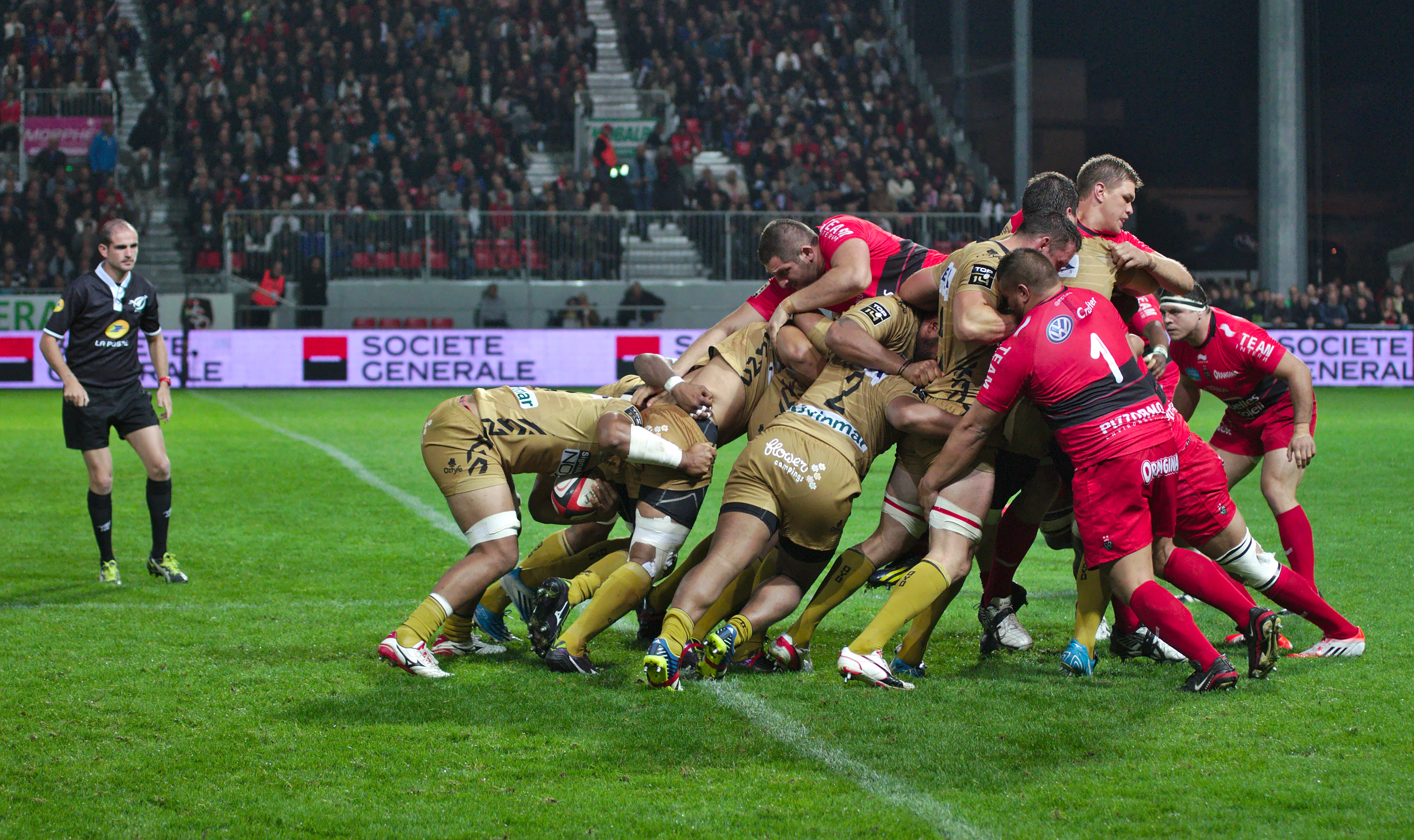 USO-RCT - 20141003 - Maul